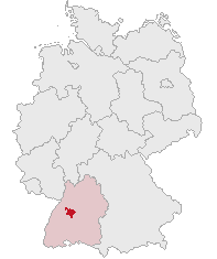 Landkreis Calw, Baden-Württemberg, Germany